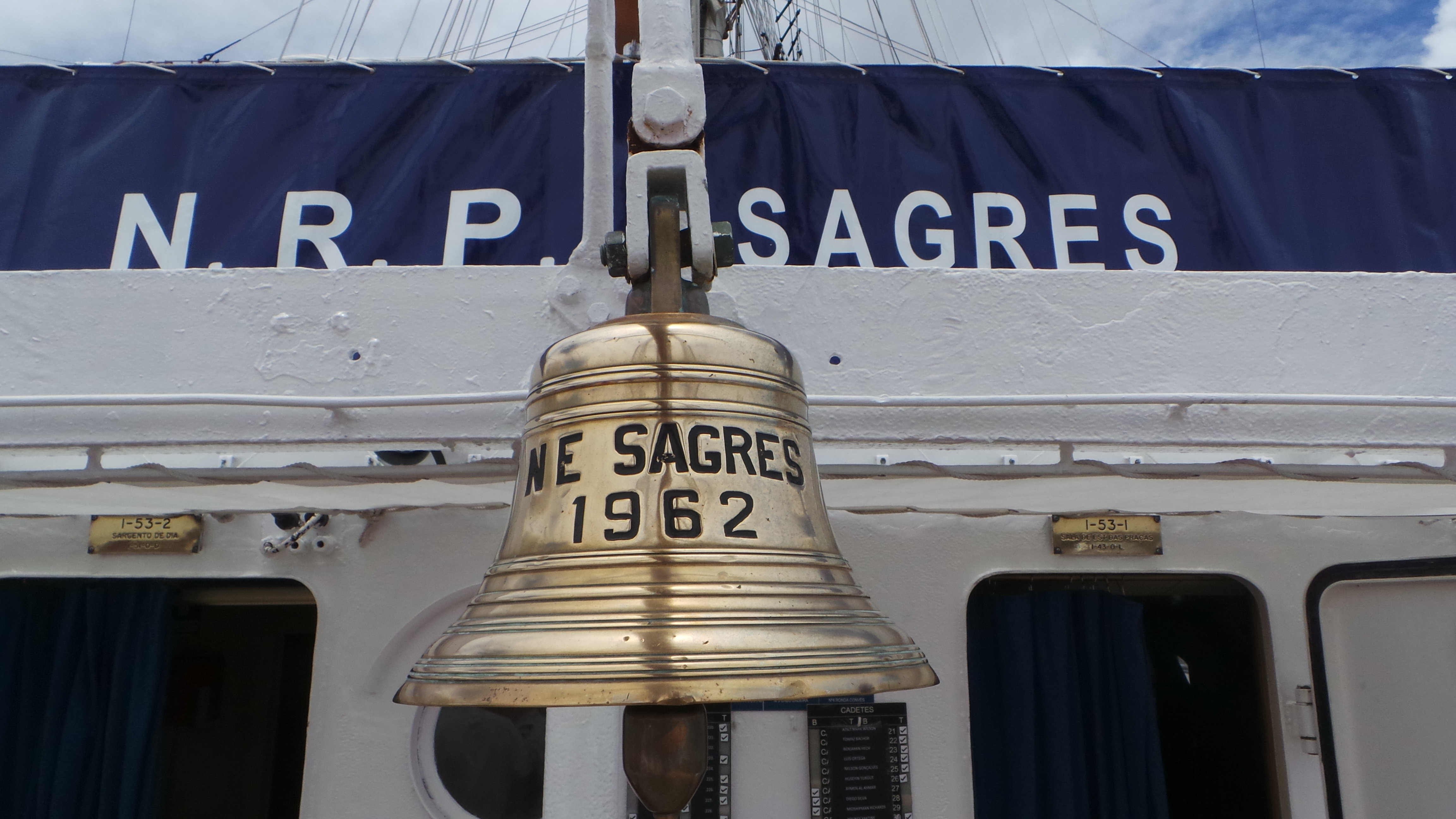 Visita al Buque Escuela NRP Sagres, en La Base Naval de Las Palmas de Gran Canaria. Este fin de semana de semana ( 20, 21 y 22 de junio de 2014) tenemos la oportunidad de disfrutar, en Las Palmas de Gran Canaria, de la visita del buque escuela portugués NRP Sagres, se encuentra atracado en el muelle de la base naval y podrá ser visitado hoy viernes hasta las 19h y mañana sábado de 10 a 12h y de 14 a 19h . El Buque proveniente de Lisboa partirá el domingo hasta Las Azores , para luego regresar a Lisboa, cuenta con unos 60 guardiamarines, con una decena de mujeres entre ellos, que realizan su periodo de instruccion Construido en 1937 en Hamburgo y tras varios avatares, fue adquirido en 1961 por la marina Portuguesa para sustituir al Sagres II, entrando en servicio como Sagres III en febrero de 1962. Tiene 89,5 metros de eslora, 12 de manga y 5,5 de calado, siendo su altura máxima de 45,5 metros. Cuenta además con 1.971 metros cuadrados de vela y desplaza 1.893 toneladas. La figura del mascarón de proa del Sagres III es el Infante D. Henrique nacido el 4 de marzo de 1394, siendo uno de los impulsores de la expansión y descubrimientos portugueses de la época. Más información del Buque : Web del Buque